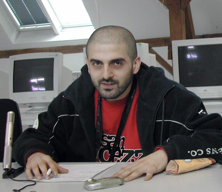 Bektas, german musician